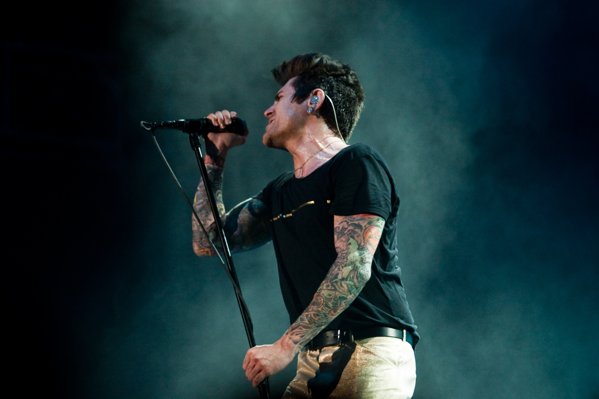 AFI-4